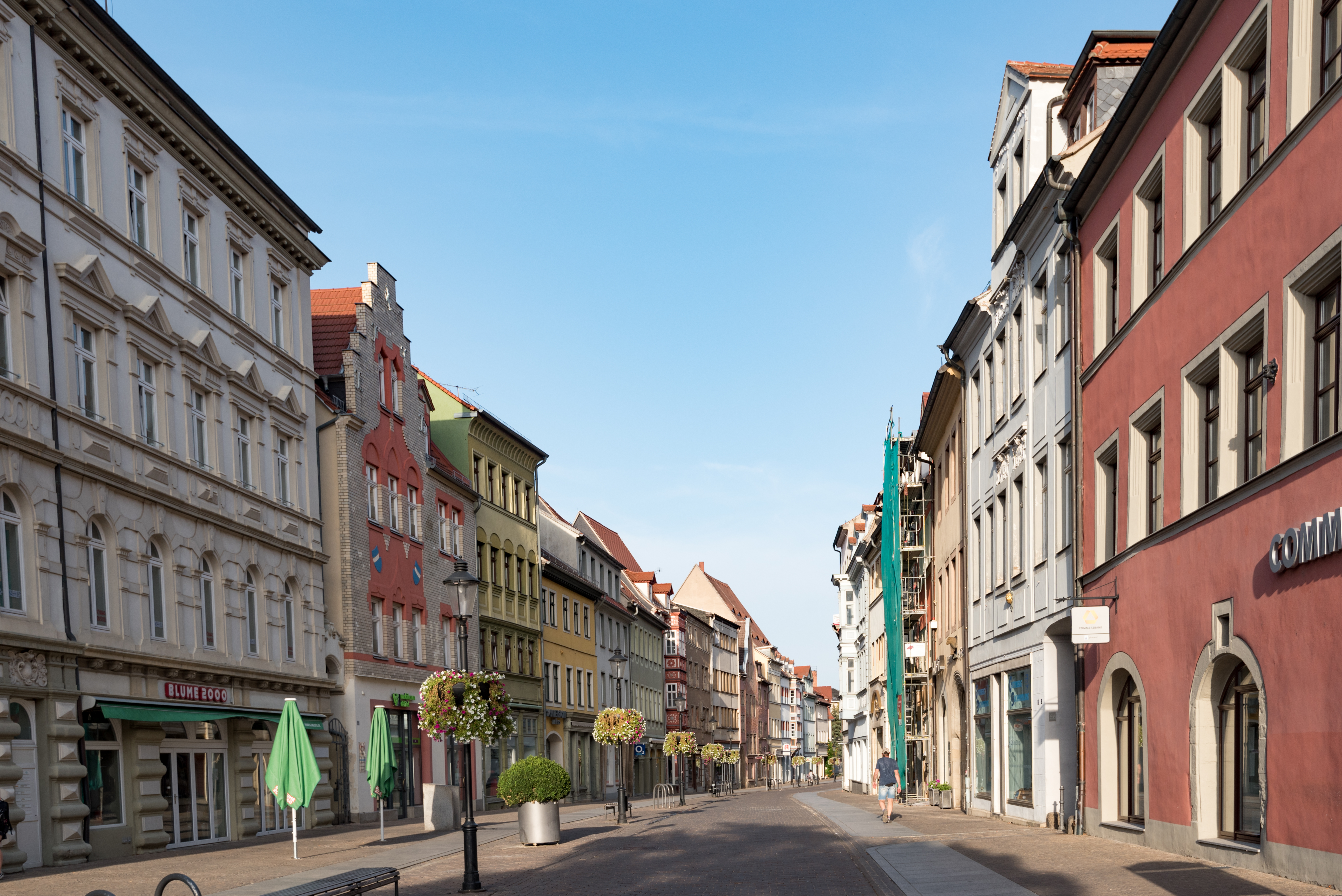 Naumburg (Saale), Jakobstraße, von Westen